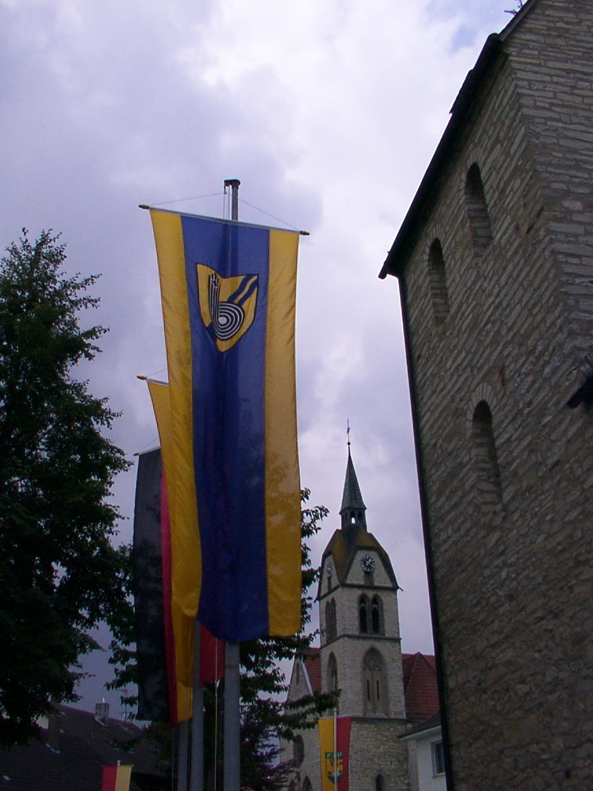 Banner der Gemeinde Borchen (Foto)